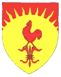 Fjerrits kommune brugte dette som dens kommunevåben. Det er en modificeret version of kommune våbenet